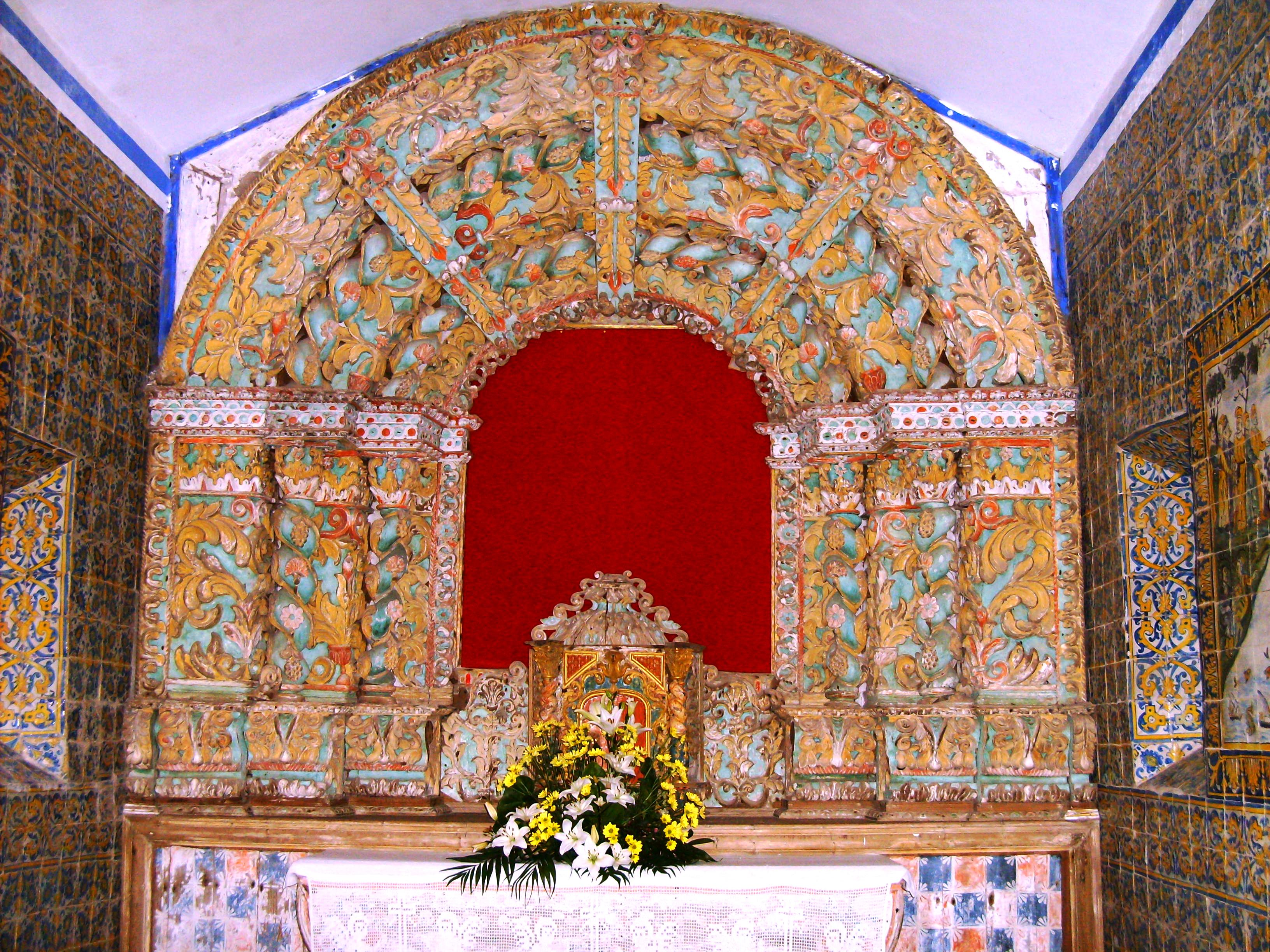 Igreja de Nossa Senhora da Vitória, Vila do Porto, Ilha de Santa Maria (Açores), Portugal.